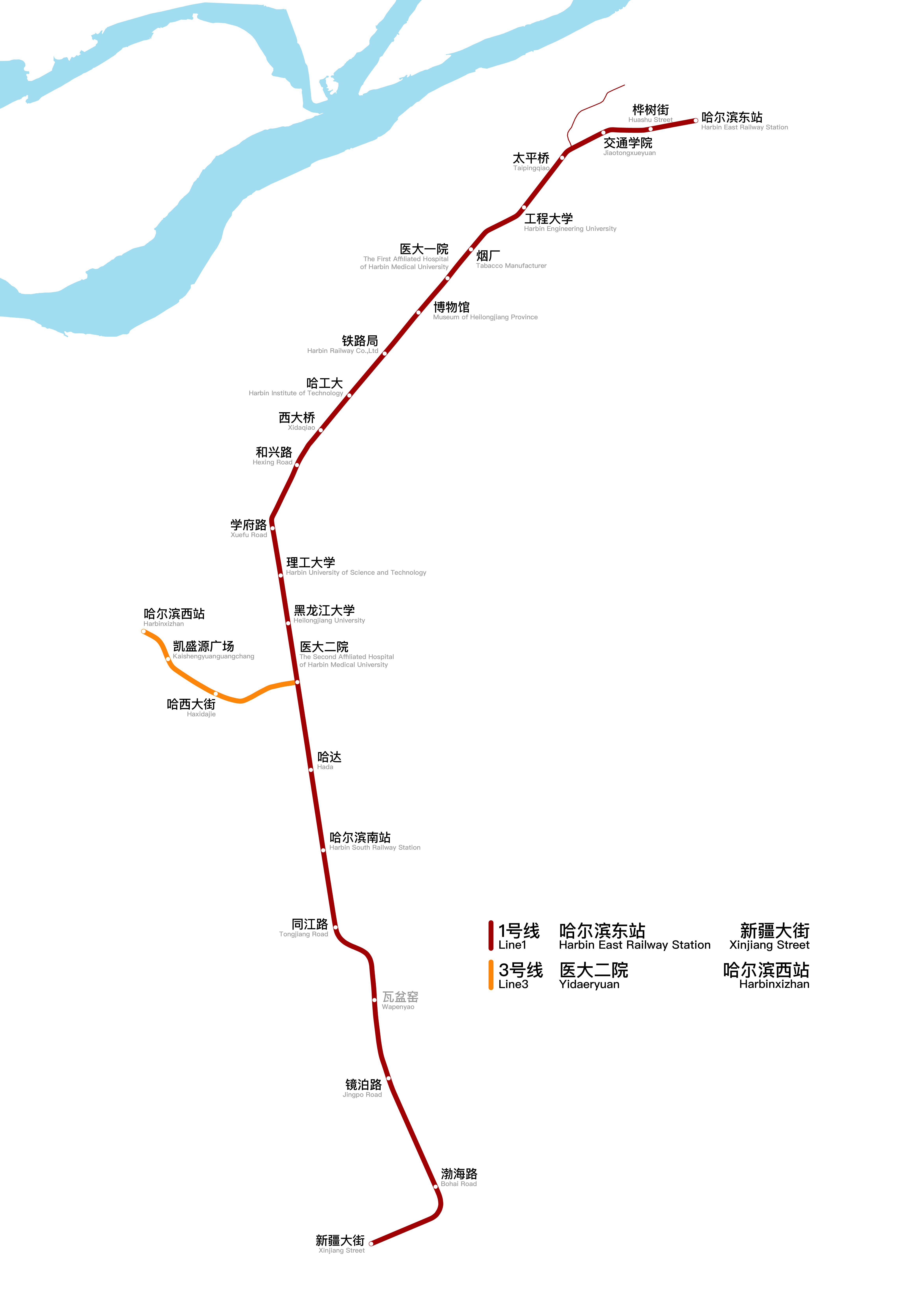 中文（中国大陆）: 哈尔滨地铁线路图，更新于2018年6月